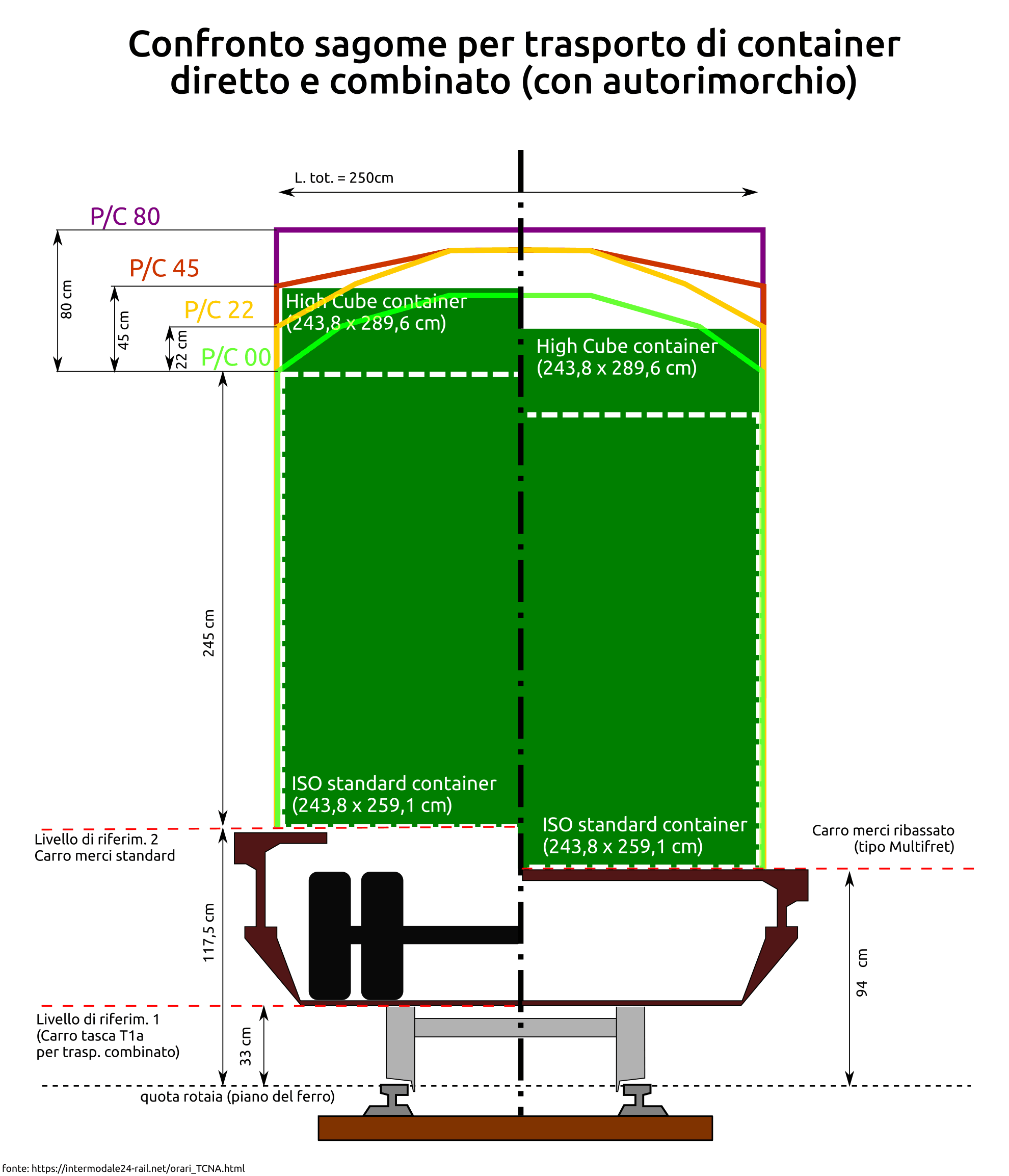 Sagome trasporto merci ferroviario